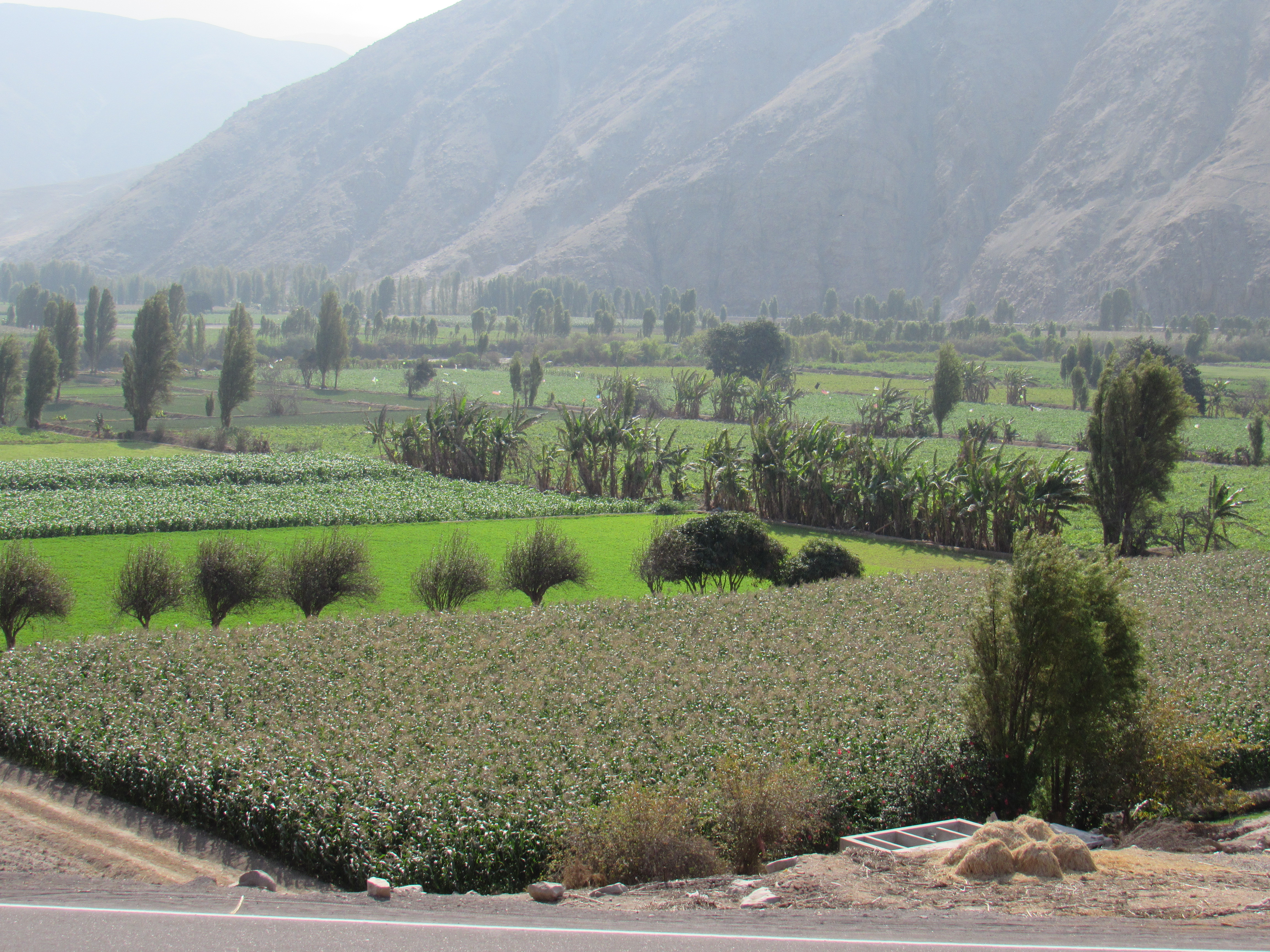 Cultivos en el Valle del Tambo (Provincia de Islay, Departamento de Arequipa, Perú).